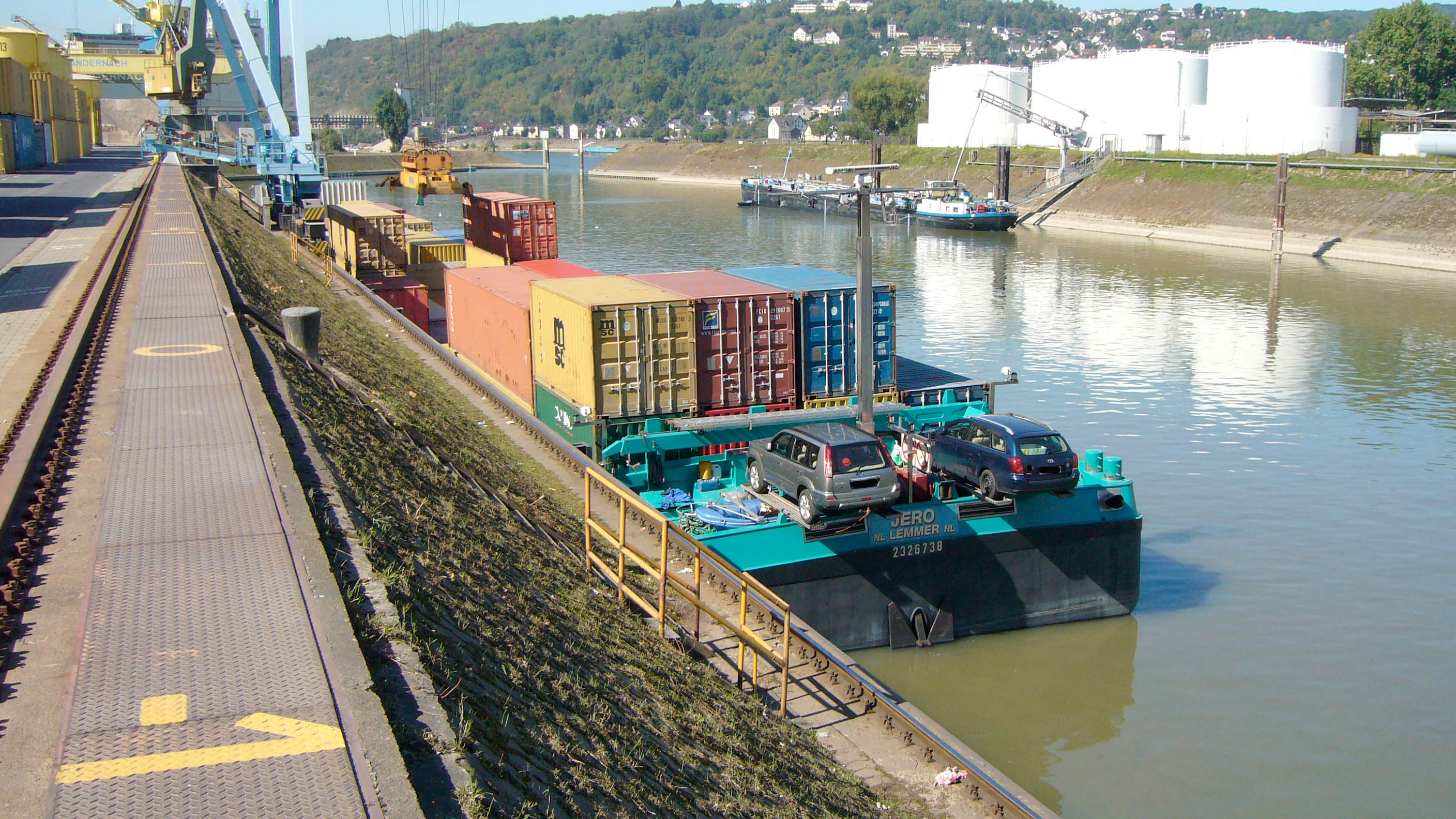 Heckansicht